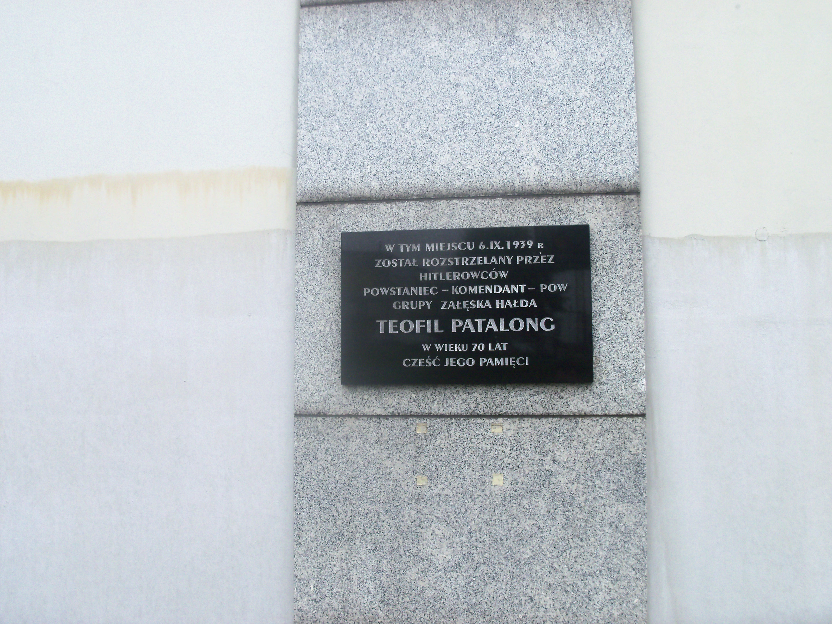 Tablica ku czci T. Patalonga w Katowicach-Załężu przy ul. Bocheńskiego (nowa - od 2012)